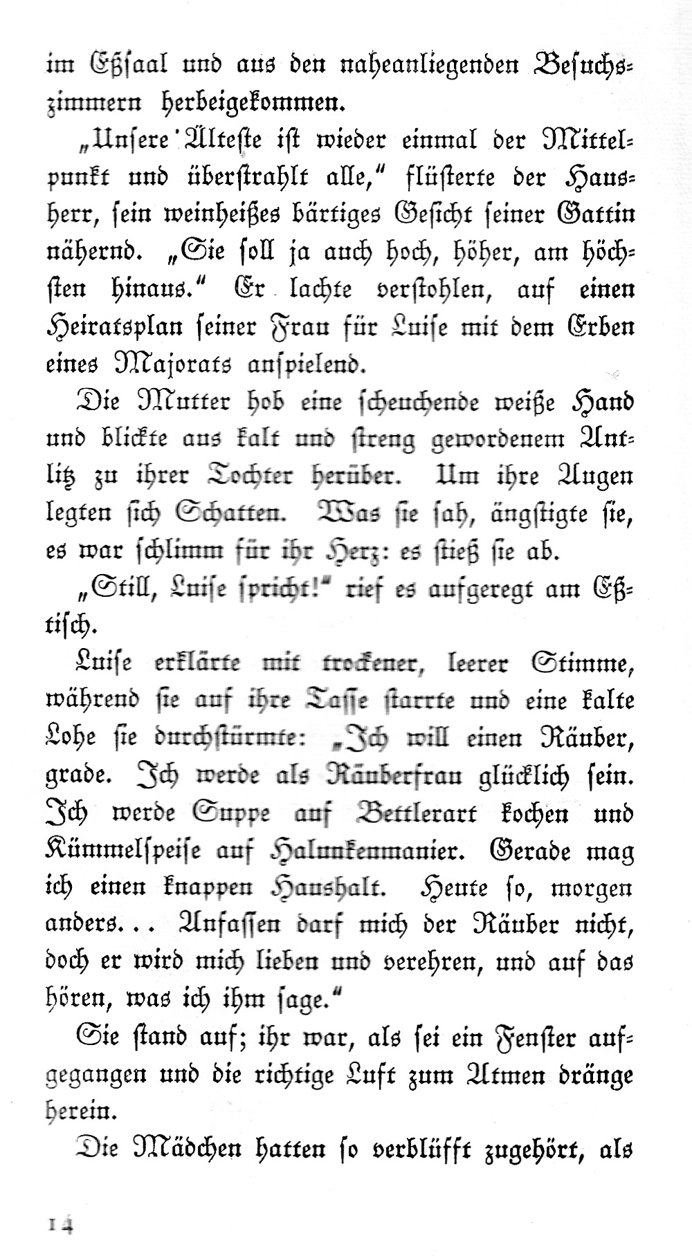 Part (page 14) of the Narrative Die Abenteuer der Oijamitza, in: Elisabeth Siewert (1867–1930), Der Sumbuddawald, Ring-Verlag, Berlin 1928.